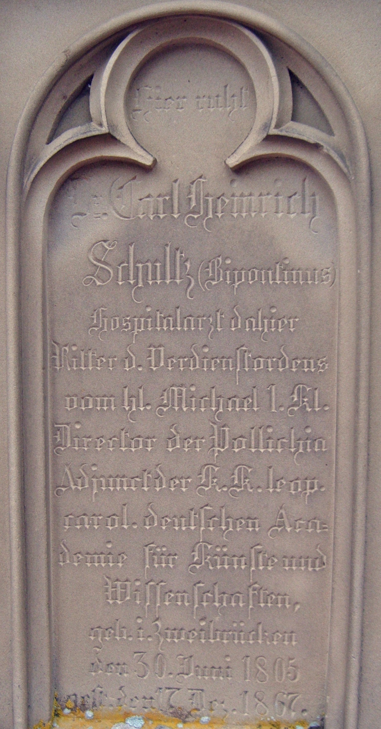 Carl Heinrich Schultz (1805-1867), Mediziner und Botaniker, Grabinschrift, Friedhof Deidesheim